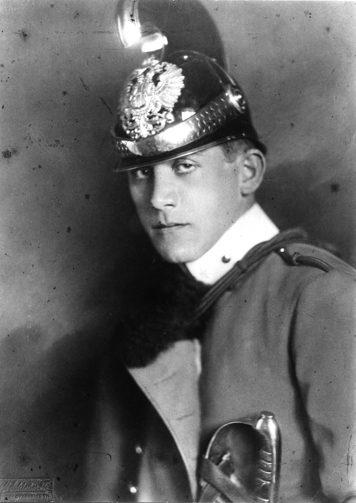 Oskar Kokoschka als Dragoner.